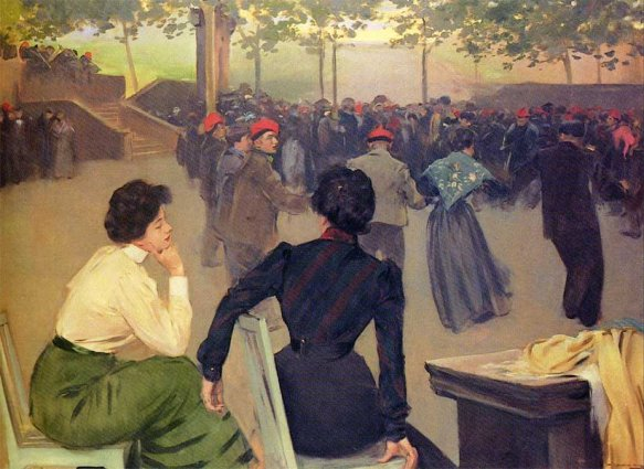 Sardanes a la font de Sant Roc a Olot. c.a. 1901-1902 (signat i no datat). Col·lecció Cercle del Liceu, Barcelona